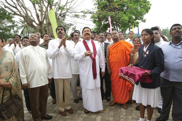 සිංහල: දන්දිනා සමරසිංහ දිසානායක ප්‍රසාද සමරු ශාලාව විවෘත කිරීමෙන්